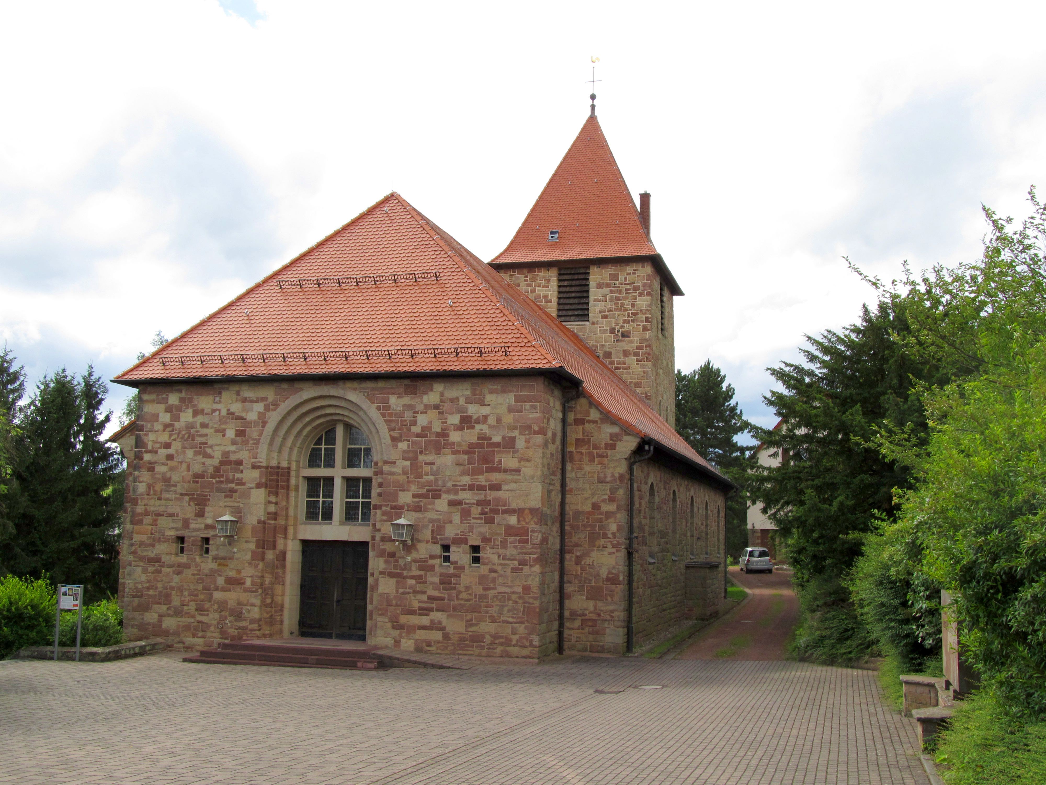 Die katholische Kirche St. Josef in Heckendalheim, Gemeinde Mandelbachtal, Saarland